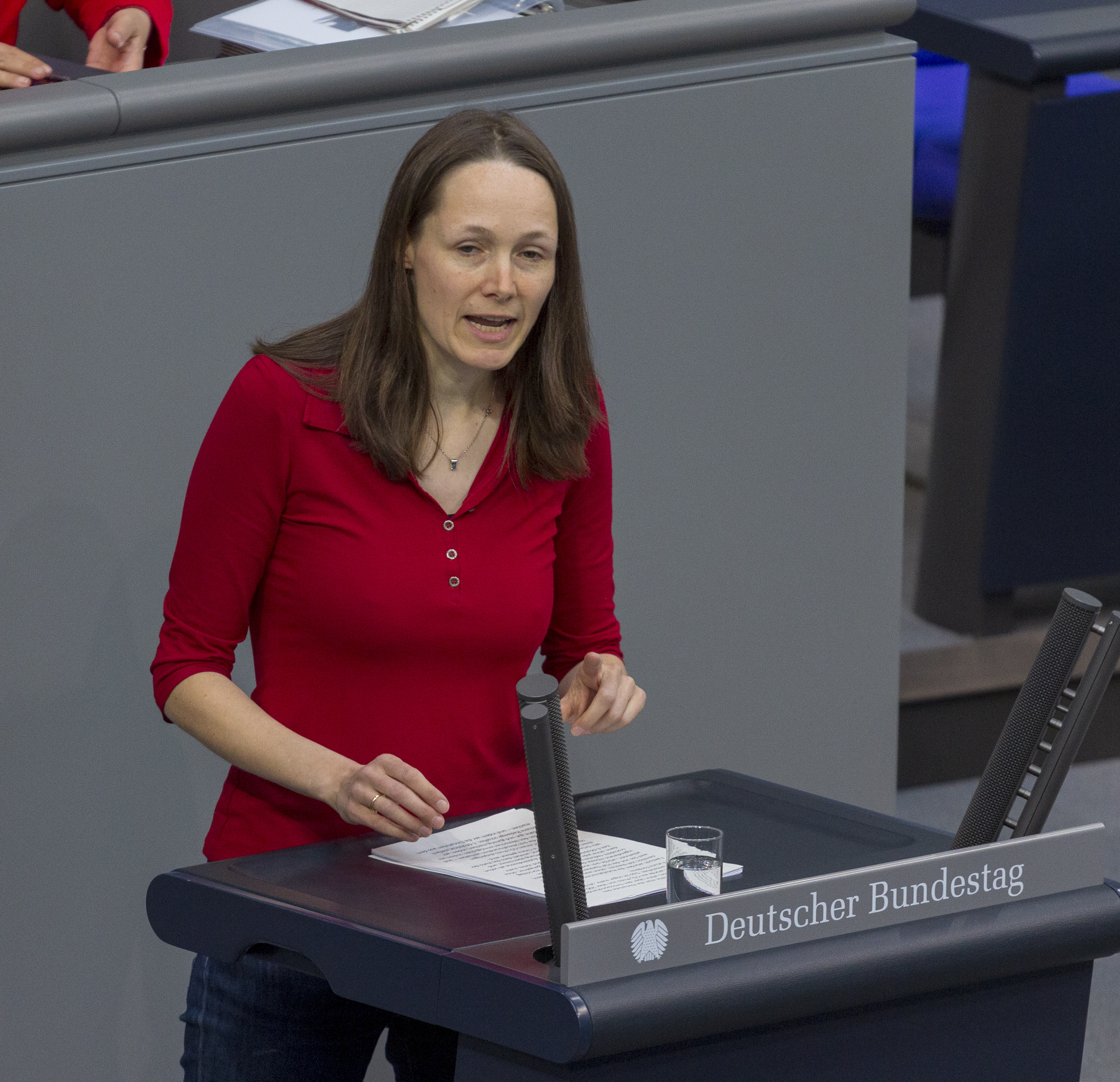 Plenarsitzung des Deutschen Bundestages am 9. Mai 2019 in Berlin.